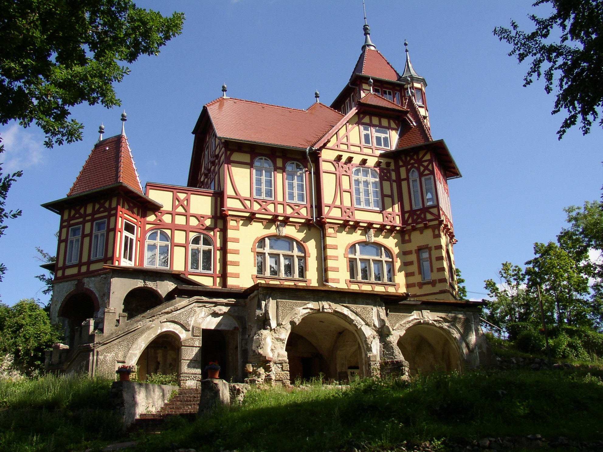 Vyhlídková výletní restaurace Hrádek, Hrádek 1726, Varnsdorf.